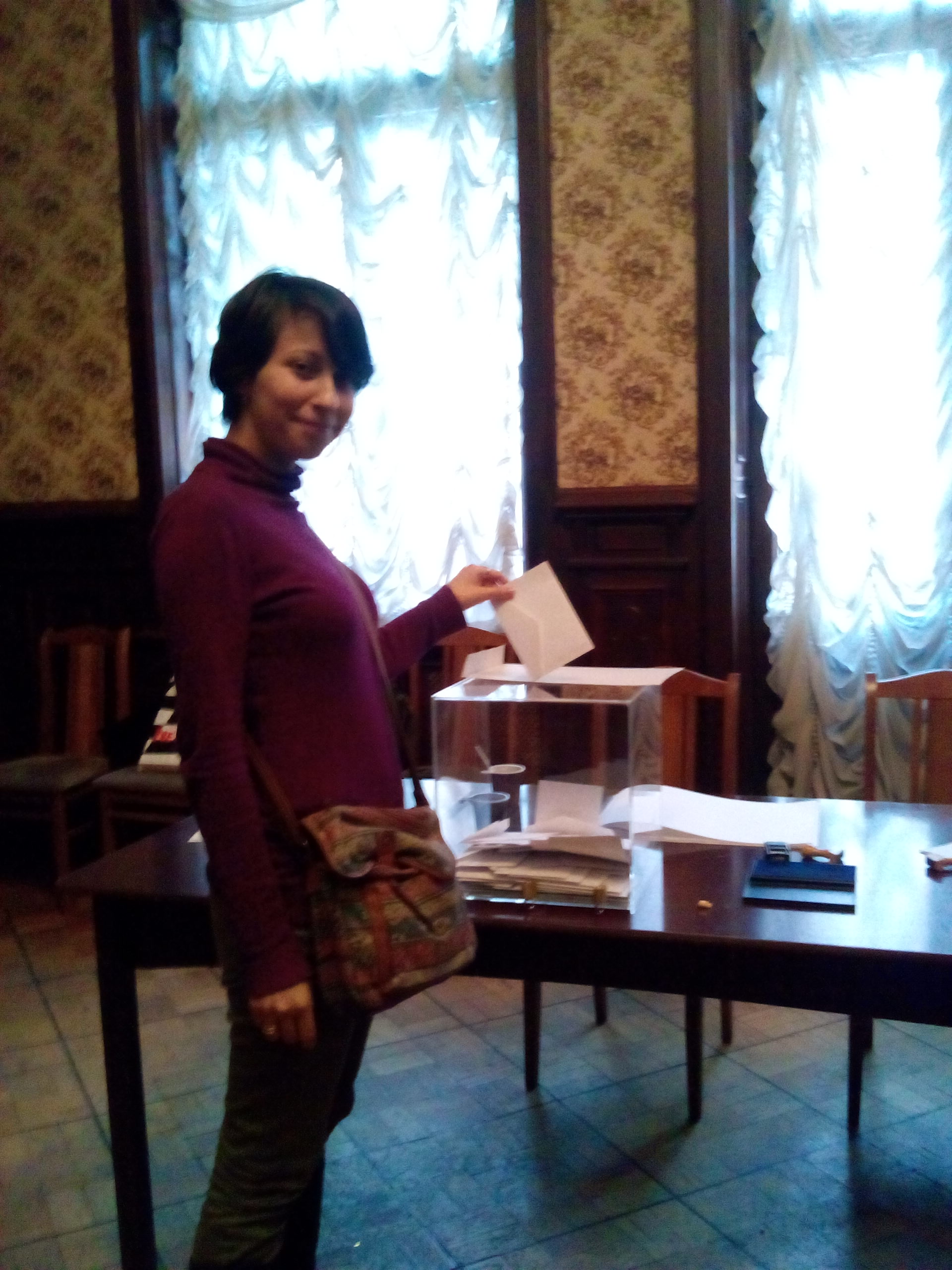 Élections présidentielle algérienne le 12 avril 2014 en Russie dans le bureau de Saint-Pétersbourg, situé à la Maison des Nationalités, Mokhovaya ulitsa 15.